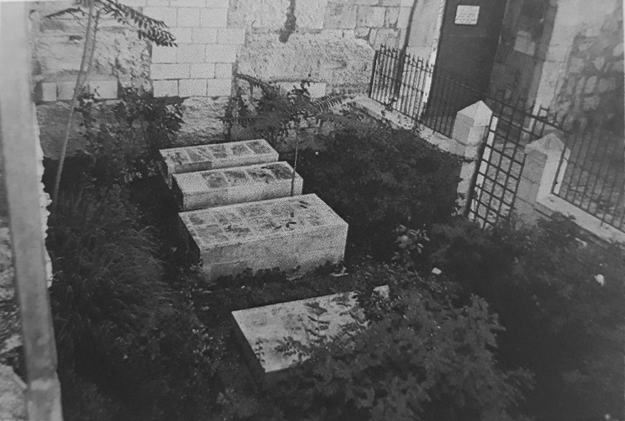 تضم هذه التربة قبور الامراء الإخشيـديين ، وهم: أبو بكر بن طغج الإخشيد المتوفى في سنة ٣٣٤هـ/ ٤٥٩م، وأبو القاسم أنوجور بن محمد المتوفى في سنة ٣٤٩هـ /٩٦٠م، وأبو الحسن علي بن محمد المتوفى في سنة ٣٥٥هـ.